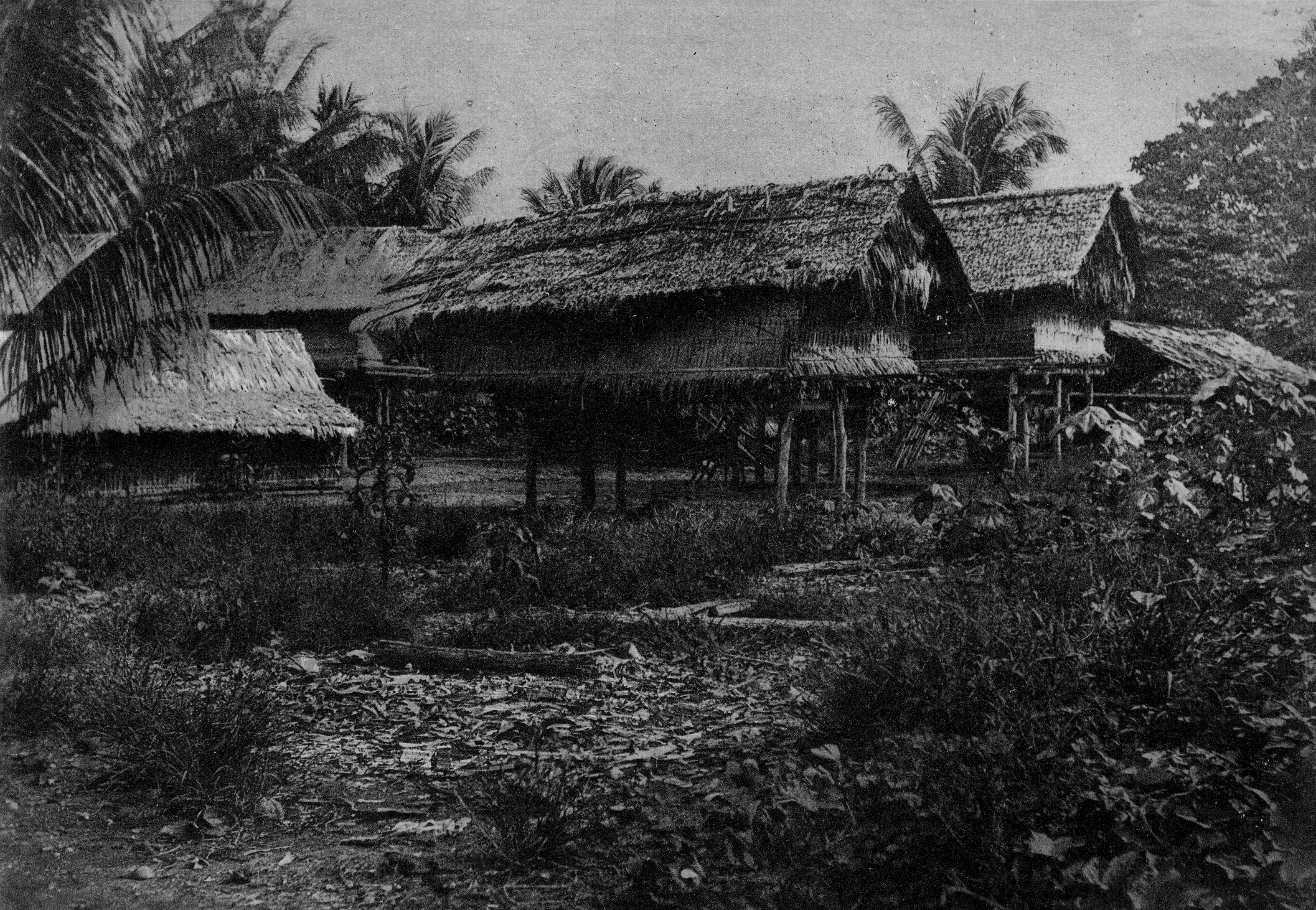 Pile dwellings in Fauro Island